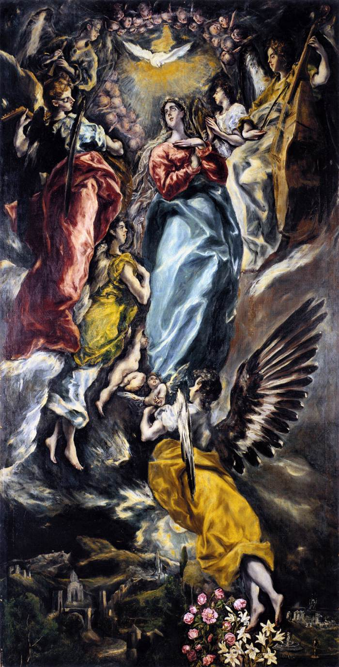 La obra representa la Inmaculada Concepción de la Virgen María.